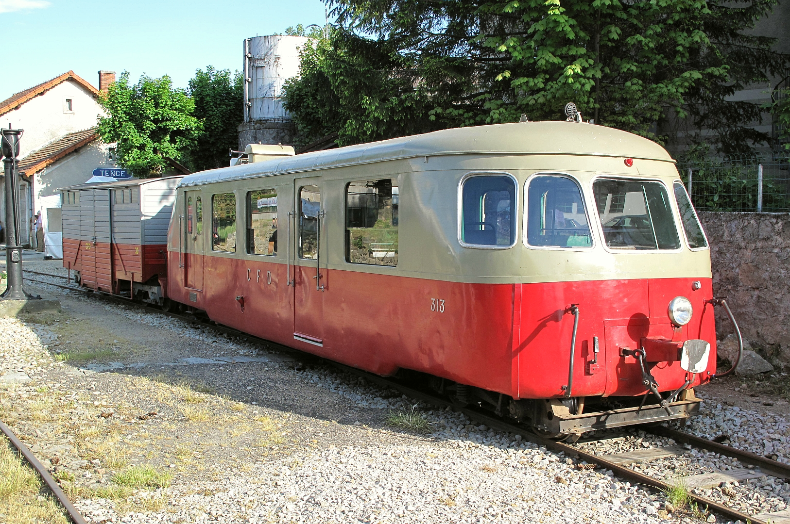 Schienenbus (Autorail) Billard A 80 D Nr. 313 der Voies Ferrées du Velay (VFV), in Tence am 20 Mai 2011.